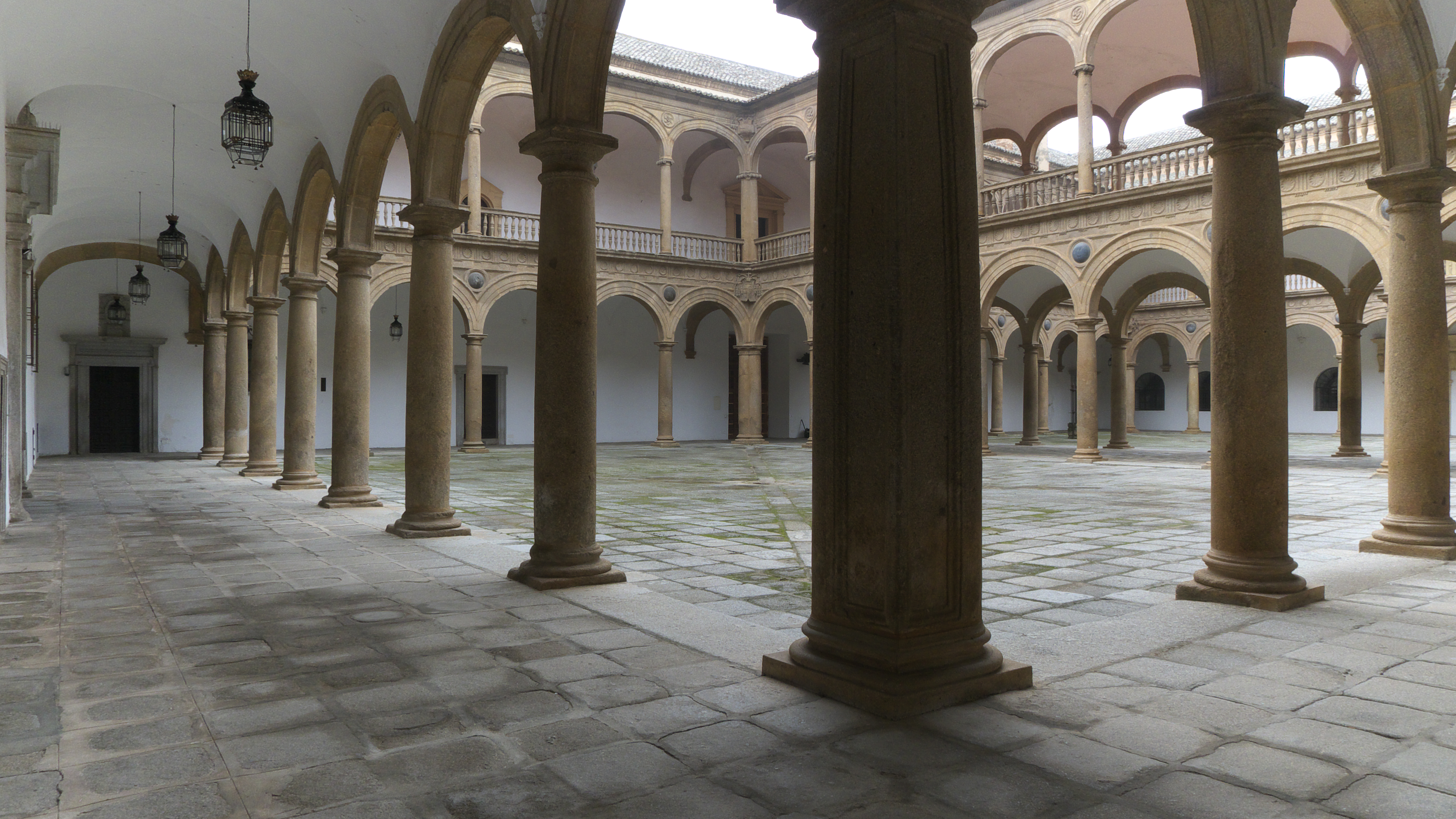 Alonso de Covarrubias complace al cardenal Juan Pardo de Tavera con unos patios ajustados al nuevo arte renacentista (1541)